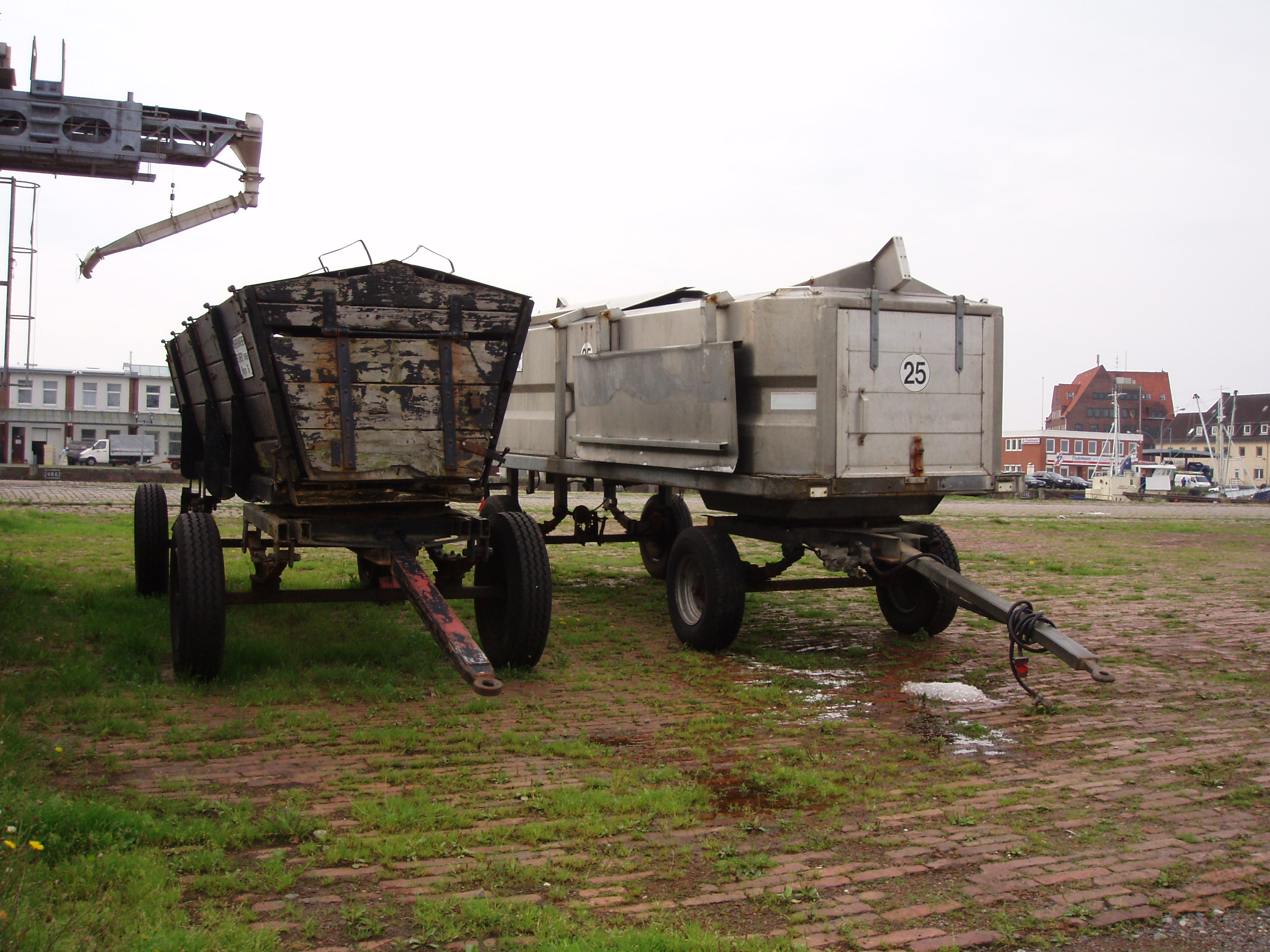 Bremerhaven, historischer und moderner Wagen der Eisfabrik